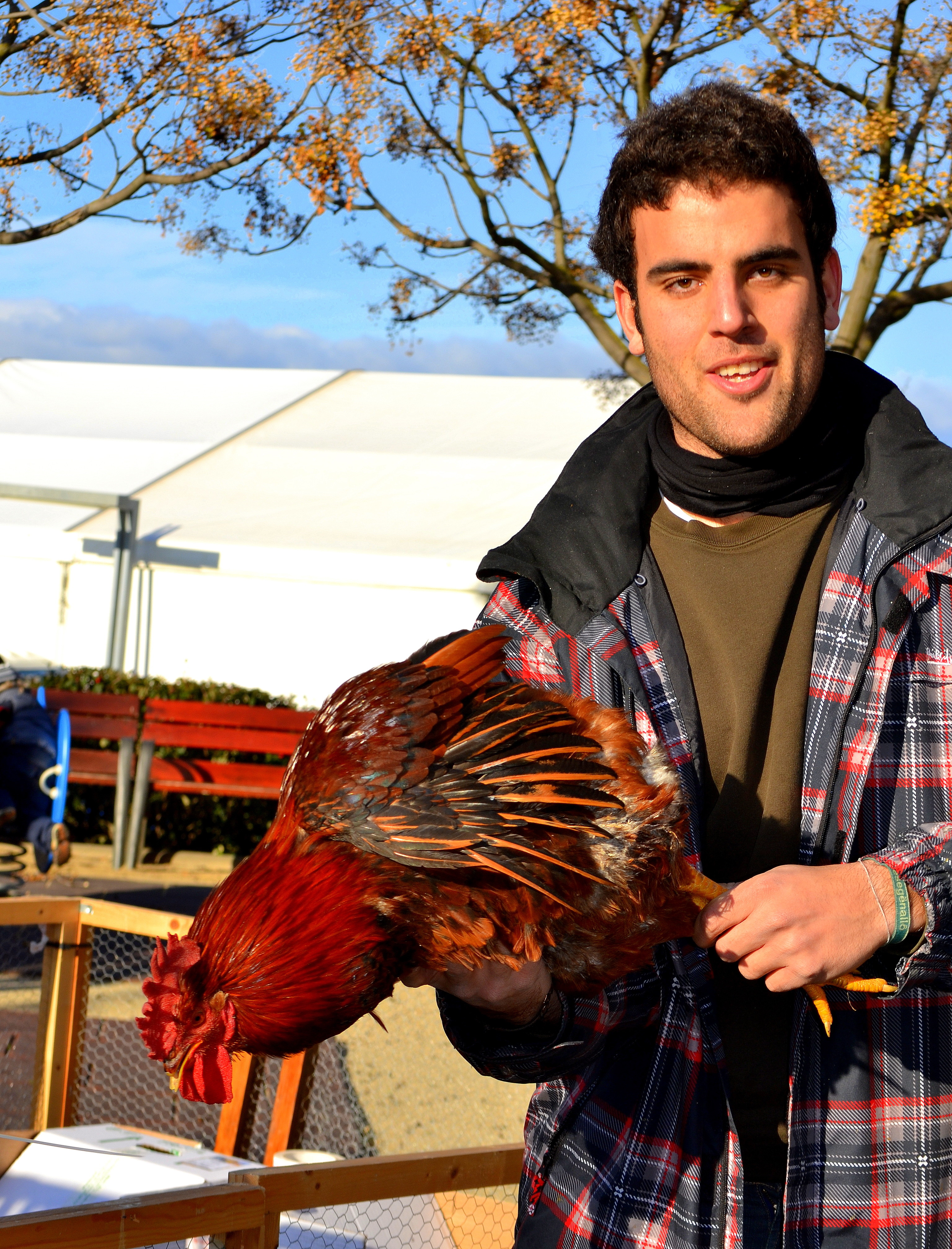 Fira del Gall, Vilafranca del Penedes. Venda d'aviram de raça penedesenca per les Festes de Nadal.